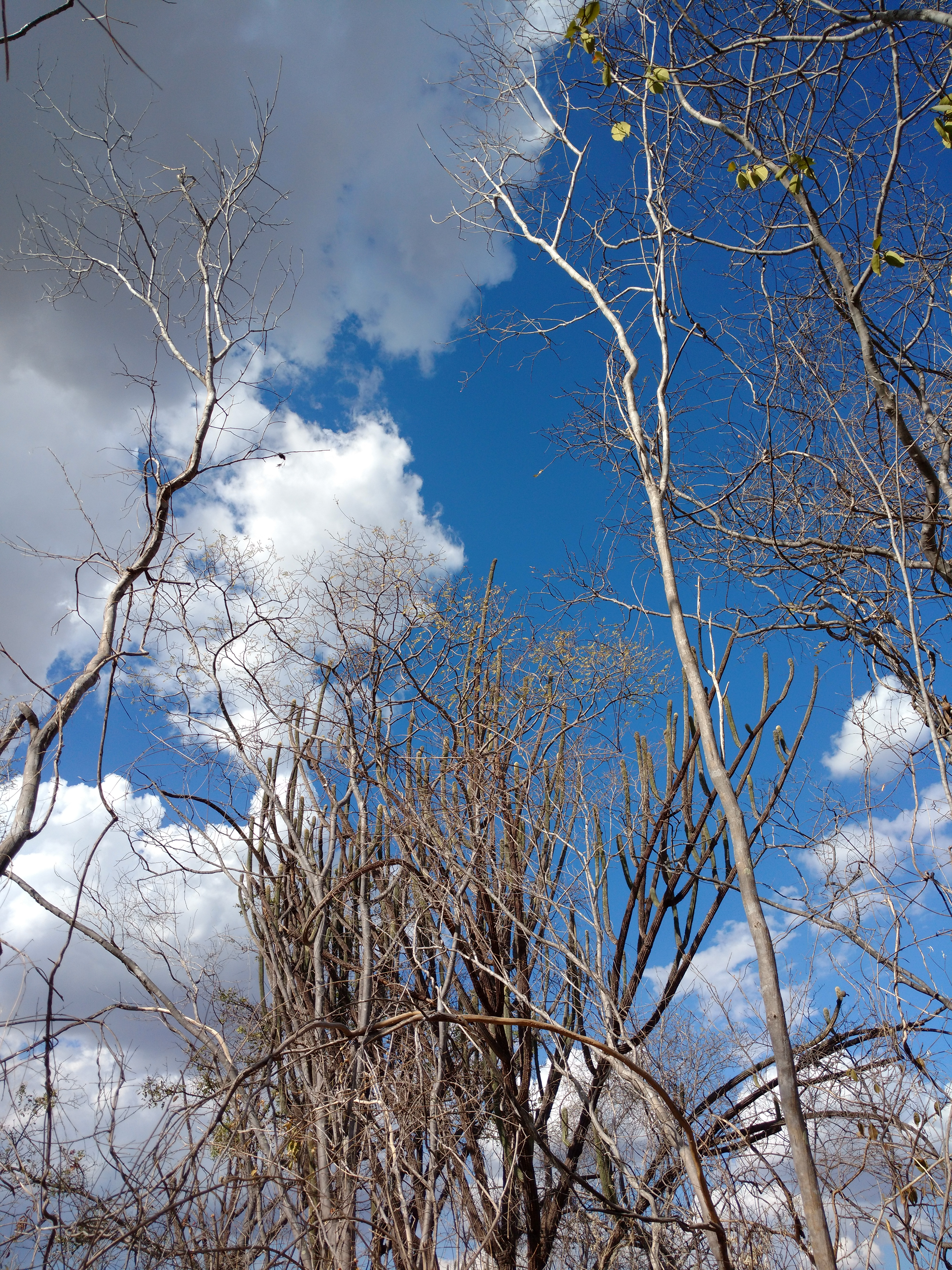 Estiagem na caatinga, Flores-PE